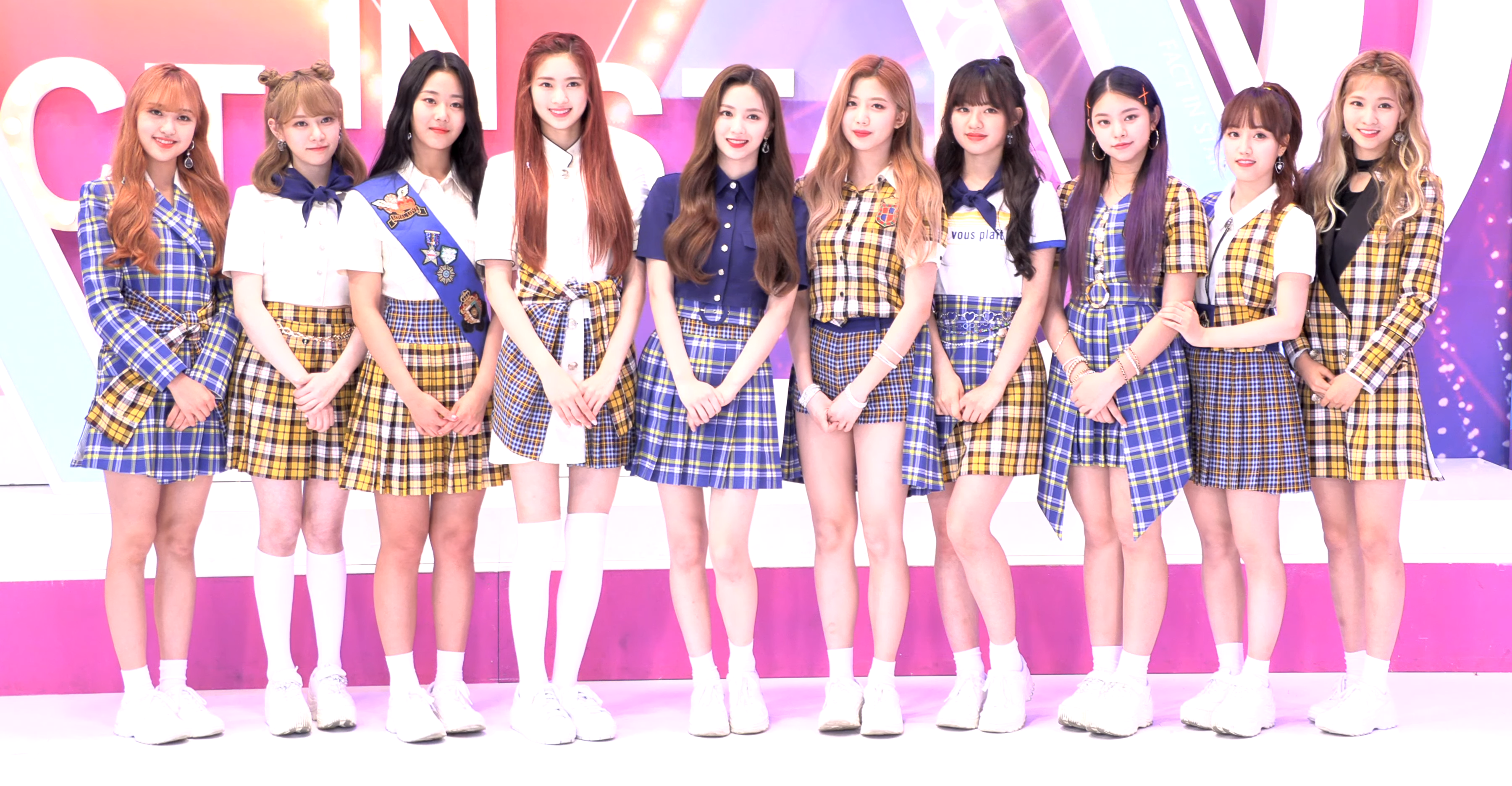 190604 체리블렛(Cherry Bullet) tbs 팩트인스타 포토타임